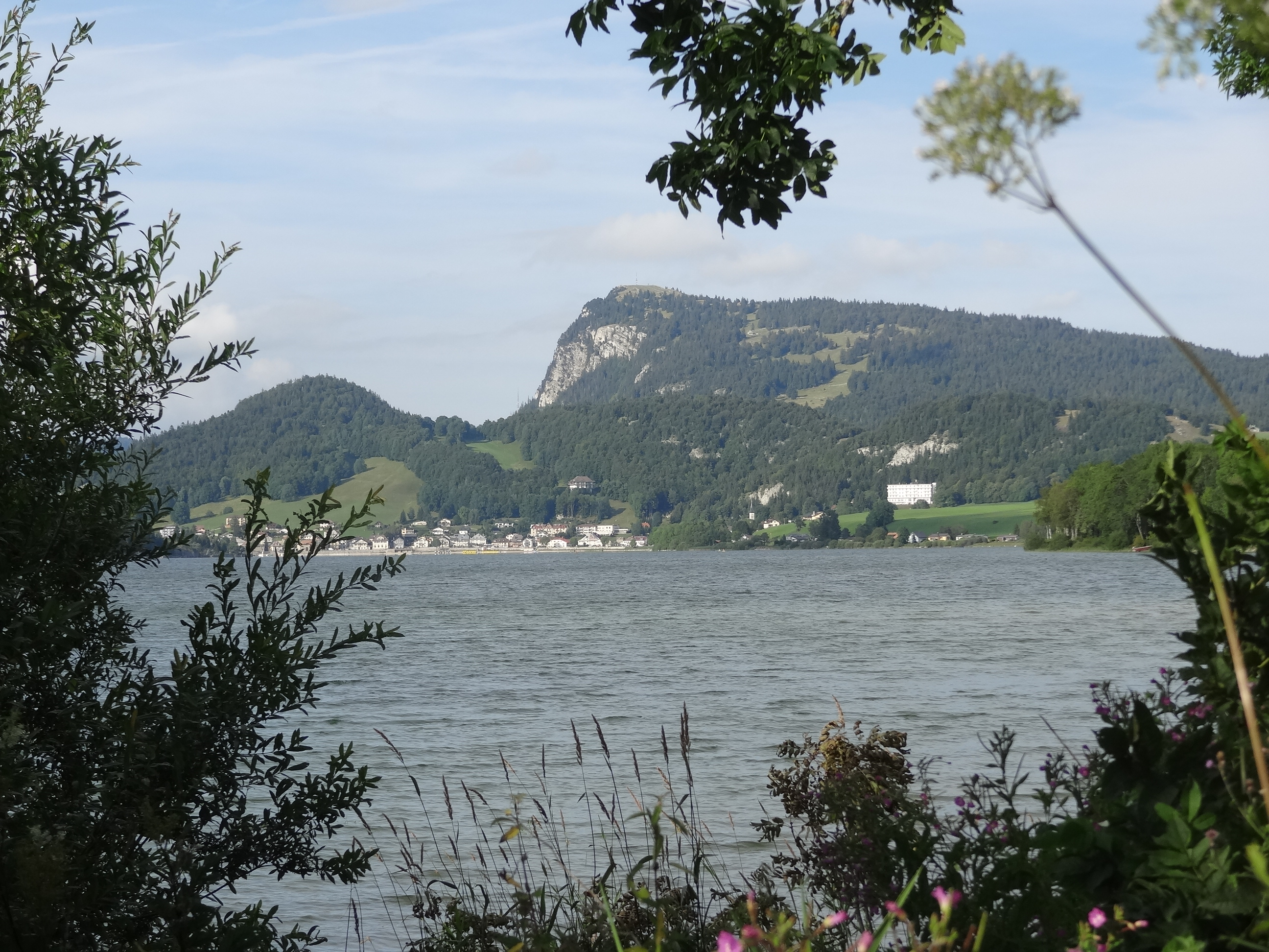 Dent de Vaulion, vue du lac de Joux